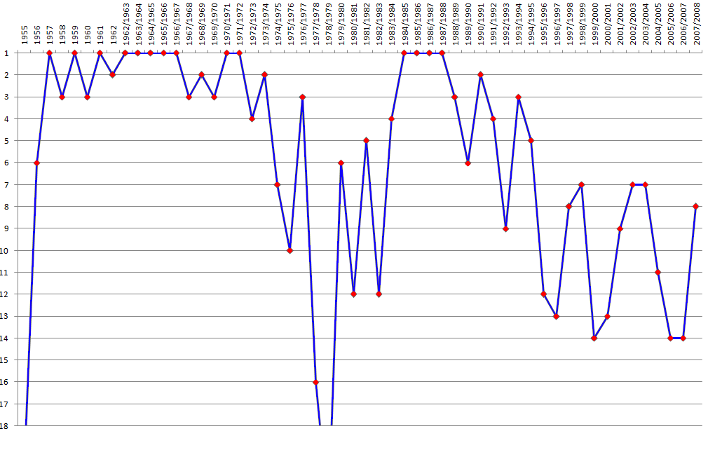 miejsca Górnika Zabrze w historii swych występów w Ekstraklasie